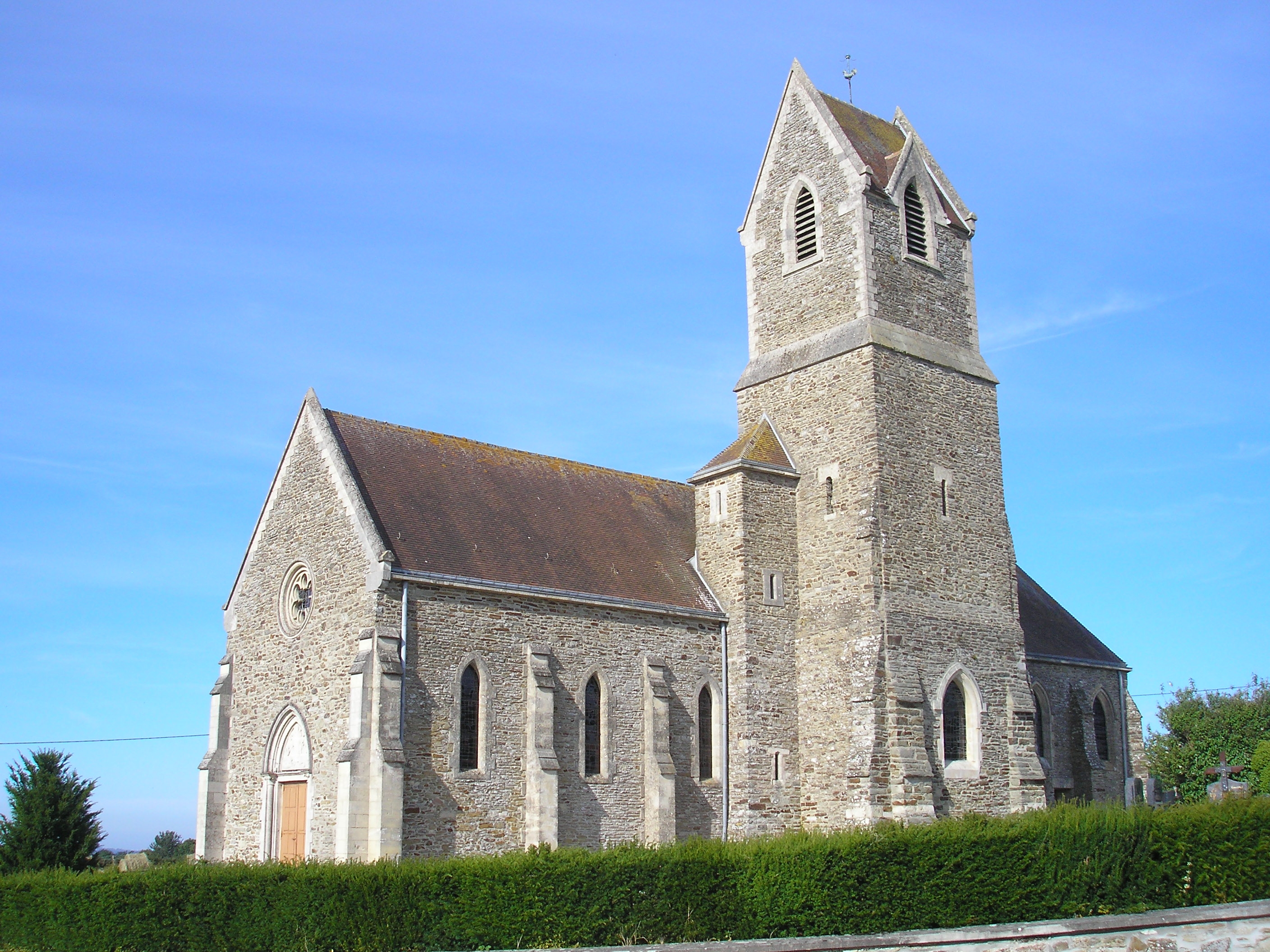 Amayé-sur-Seulles (Normandie, France). L'église Saint-Vigor.